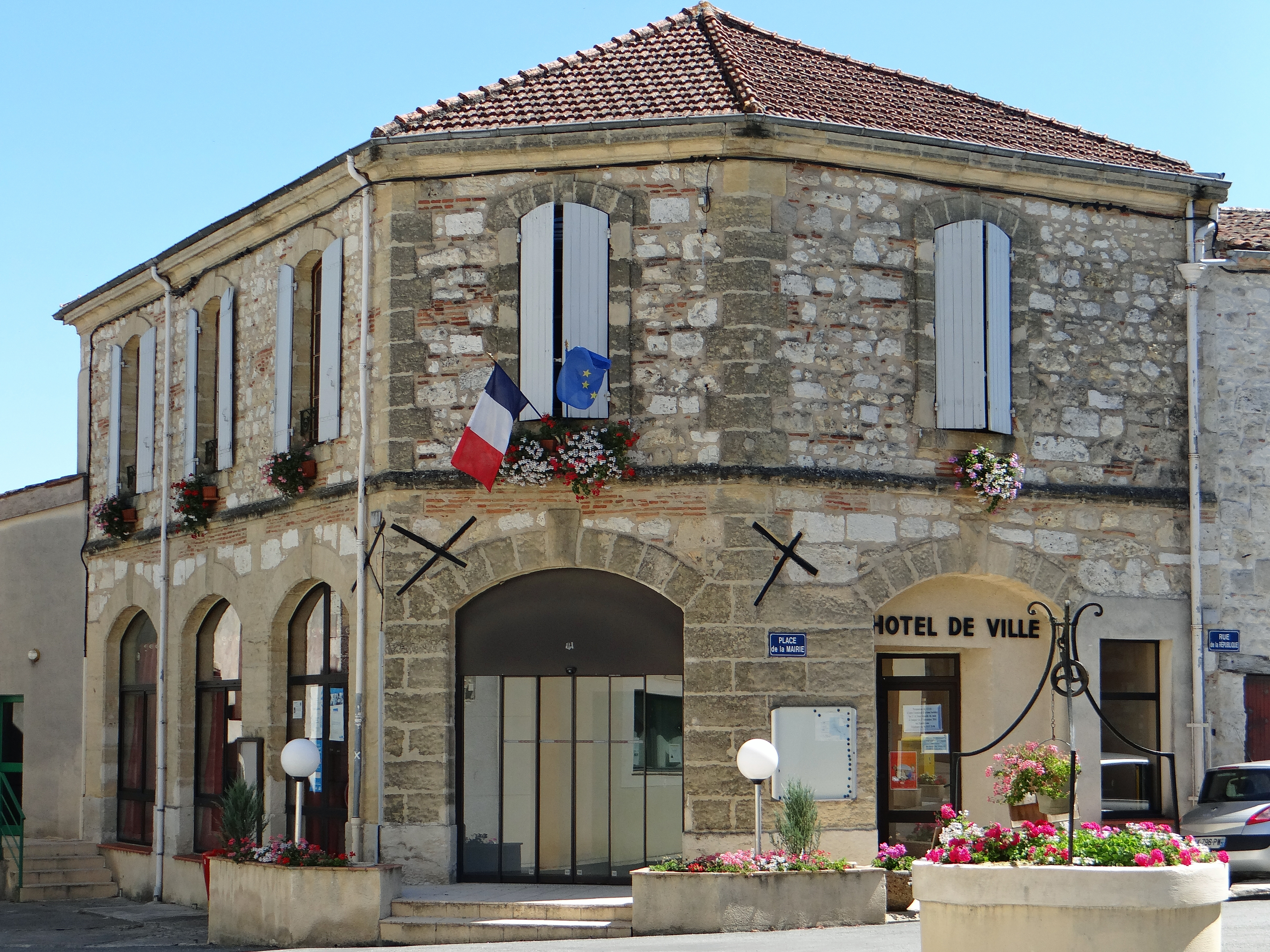 Montpezat (Lot-et-Garonne) - Mairie